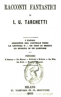 Frontespizio della raccolta I racconti fantastici di Igino Ugo Tarchetti, 1869.